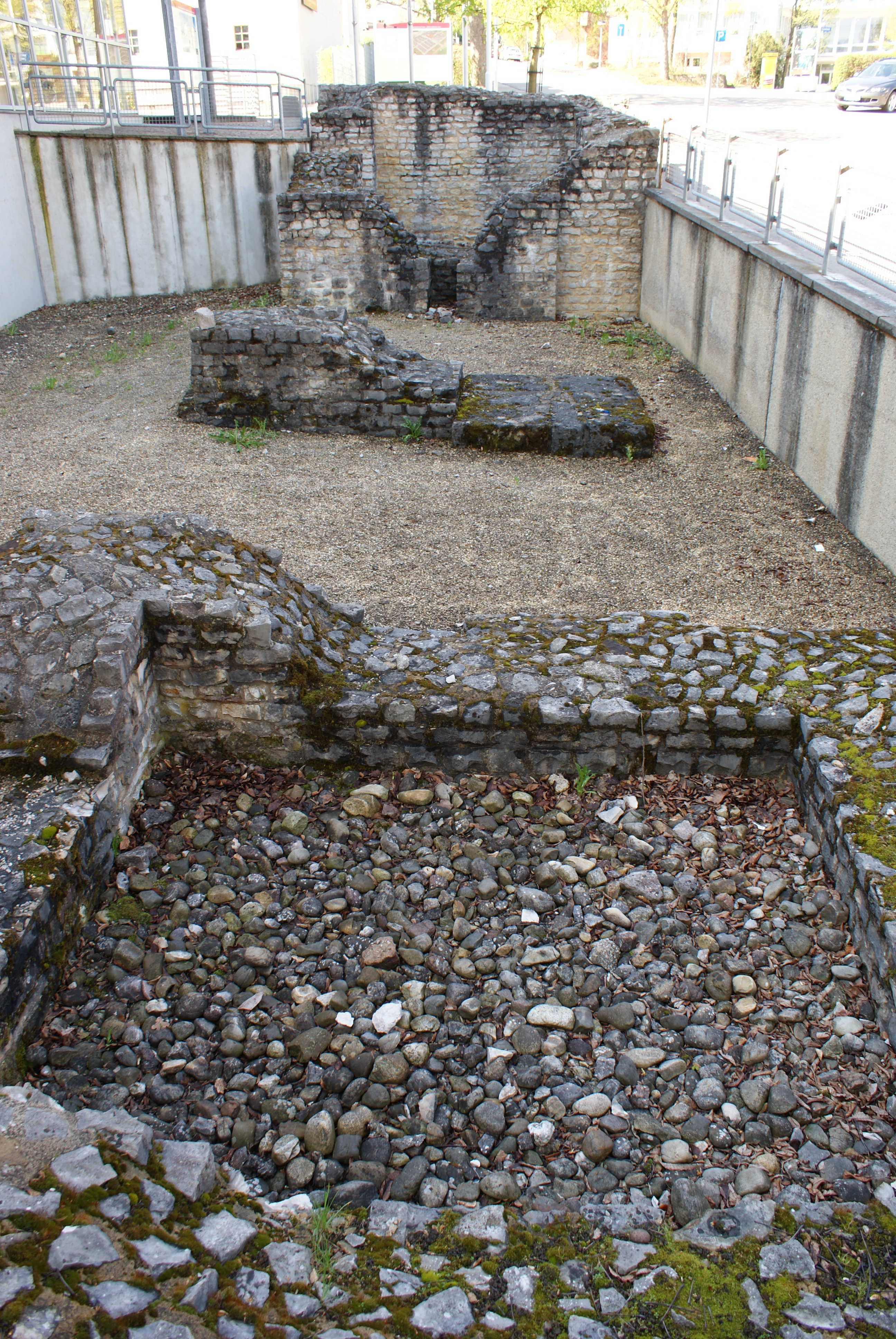 Freigelegtes Nordtor des Alenkastells vor dem Limesmuseum Aalen.